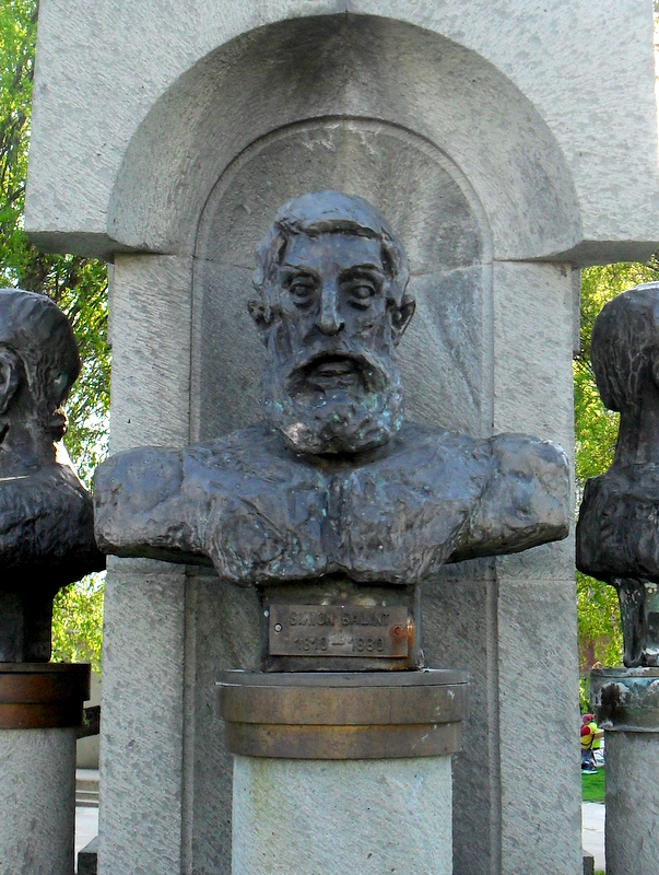 Baia Mare, popiersie Simiona Balinta (1813-1880)